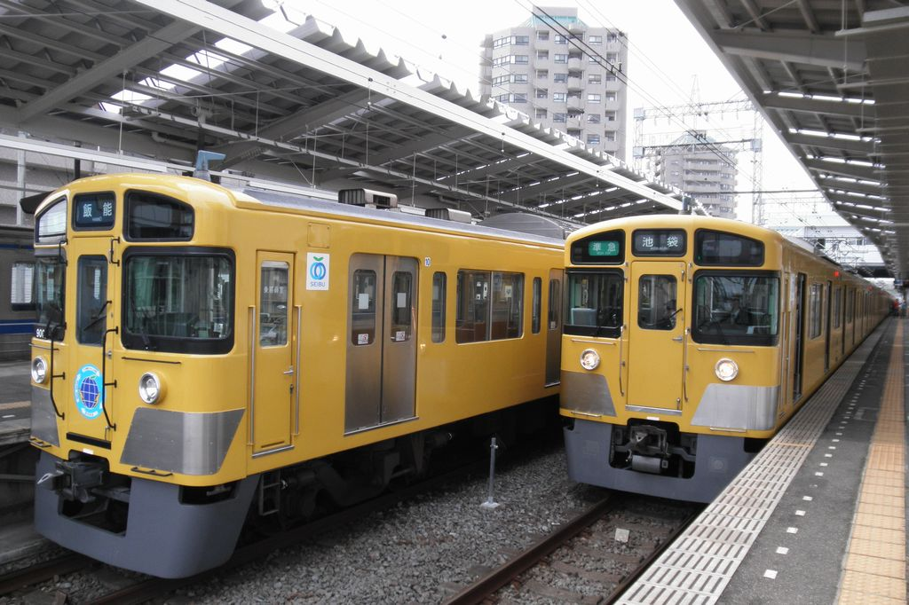 小手指駅で並ぶ準急池袋行と準急飯能行